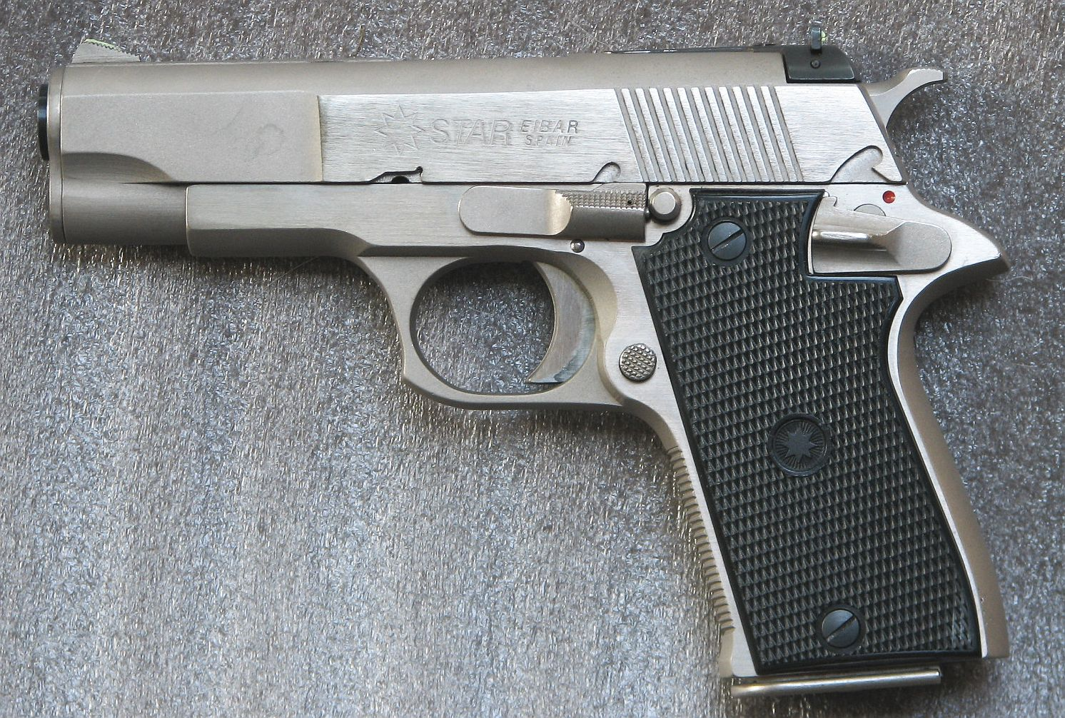 Star PD semi-automatic pistol in caliber .45 ACP